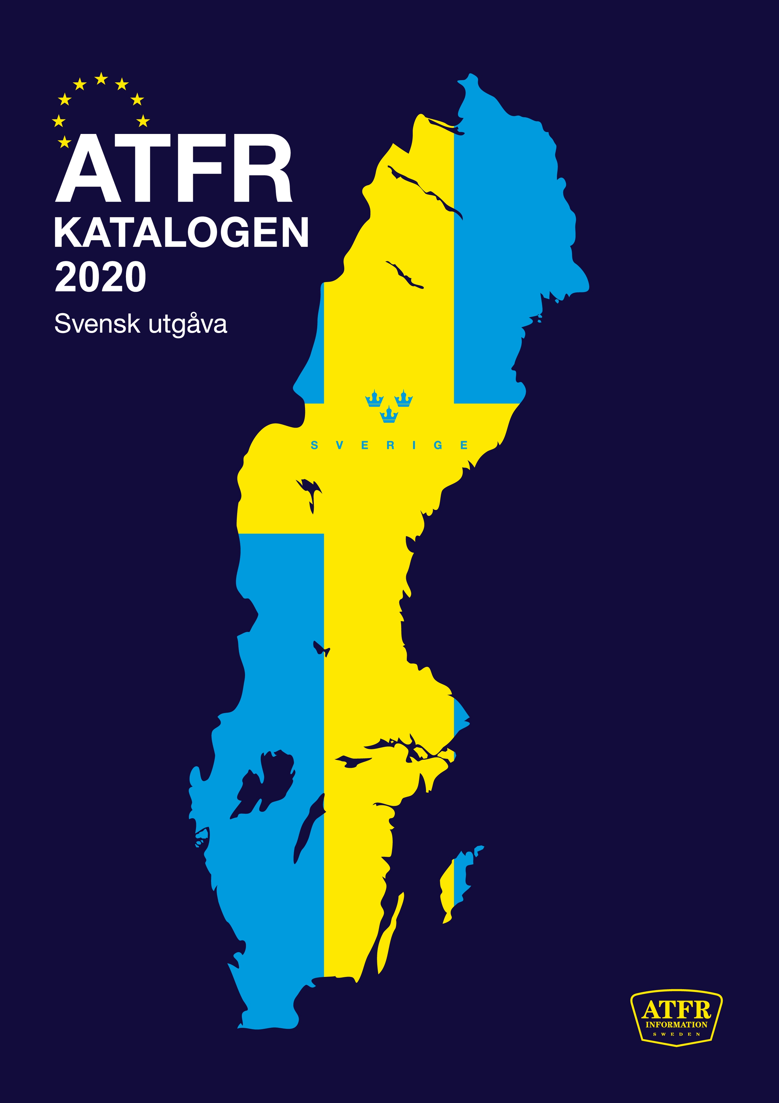 ATFR-katalogen årgång 2020, utgåva 50, sida 1 (omslag)